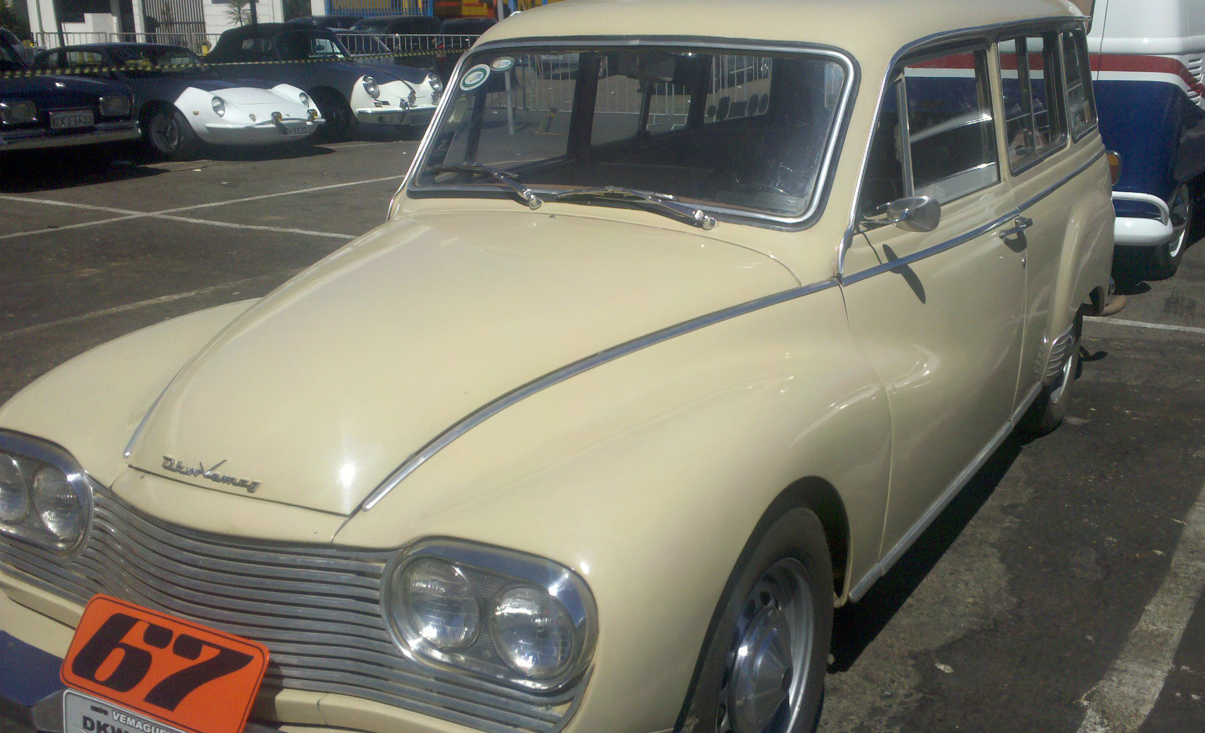 DKW-Vemag Vemaguet, late facelifted version